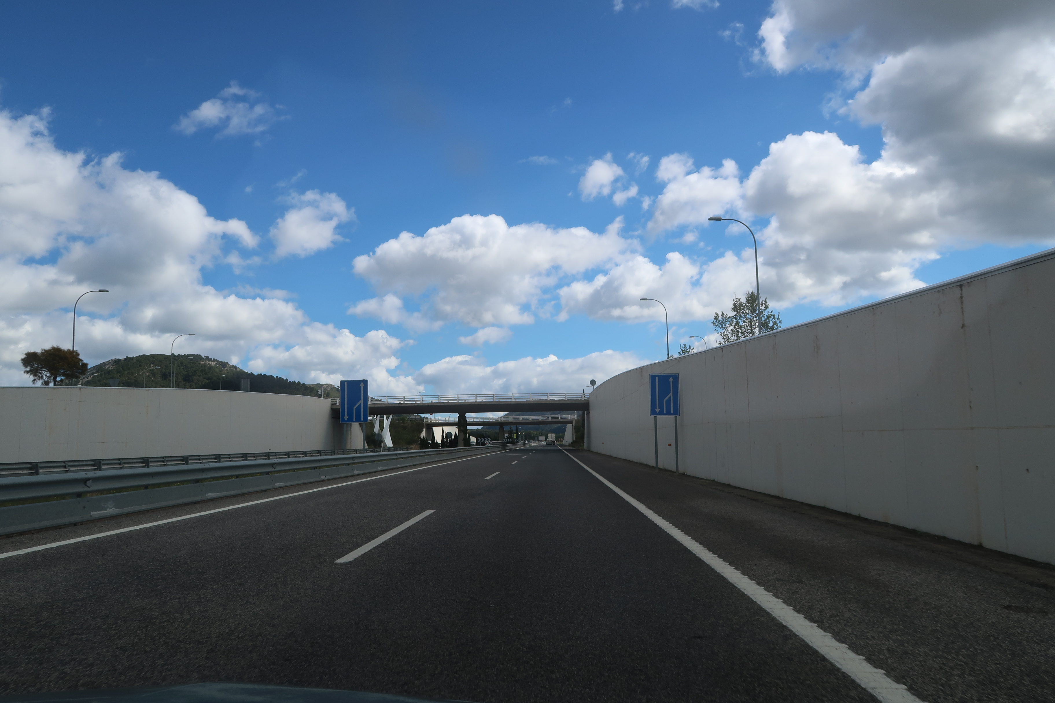 Spanien (E) - Balearische Inseln (IB) - Mallorca: Autopista Ma-13, Autobahnende Richtung Alcúdia